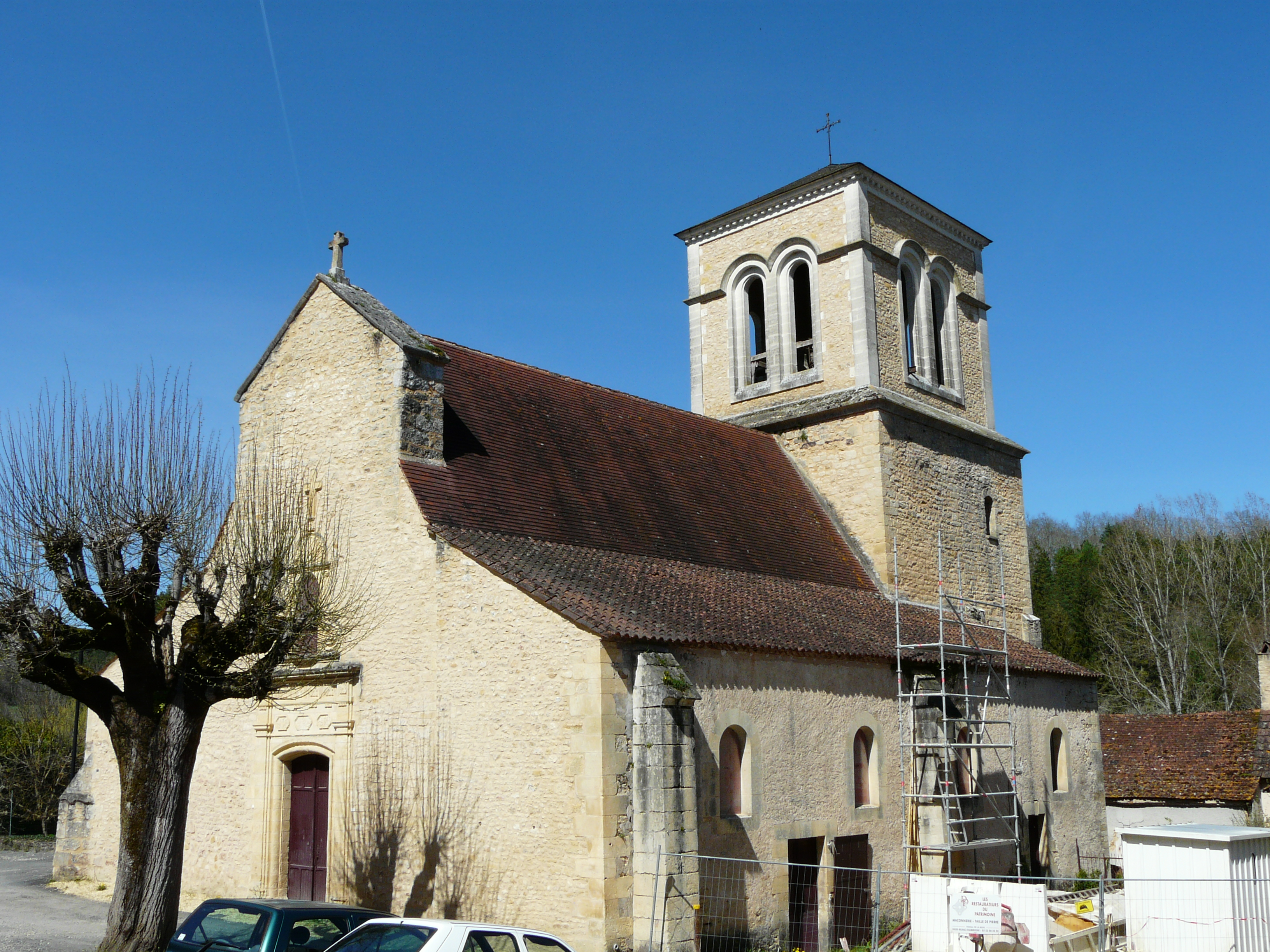 L'église Saint-Saturnin de Journiac vue depuis le sud-ouest, Dordogne, France.